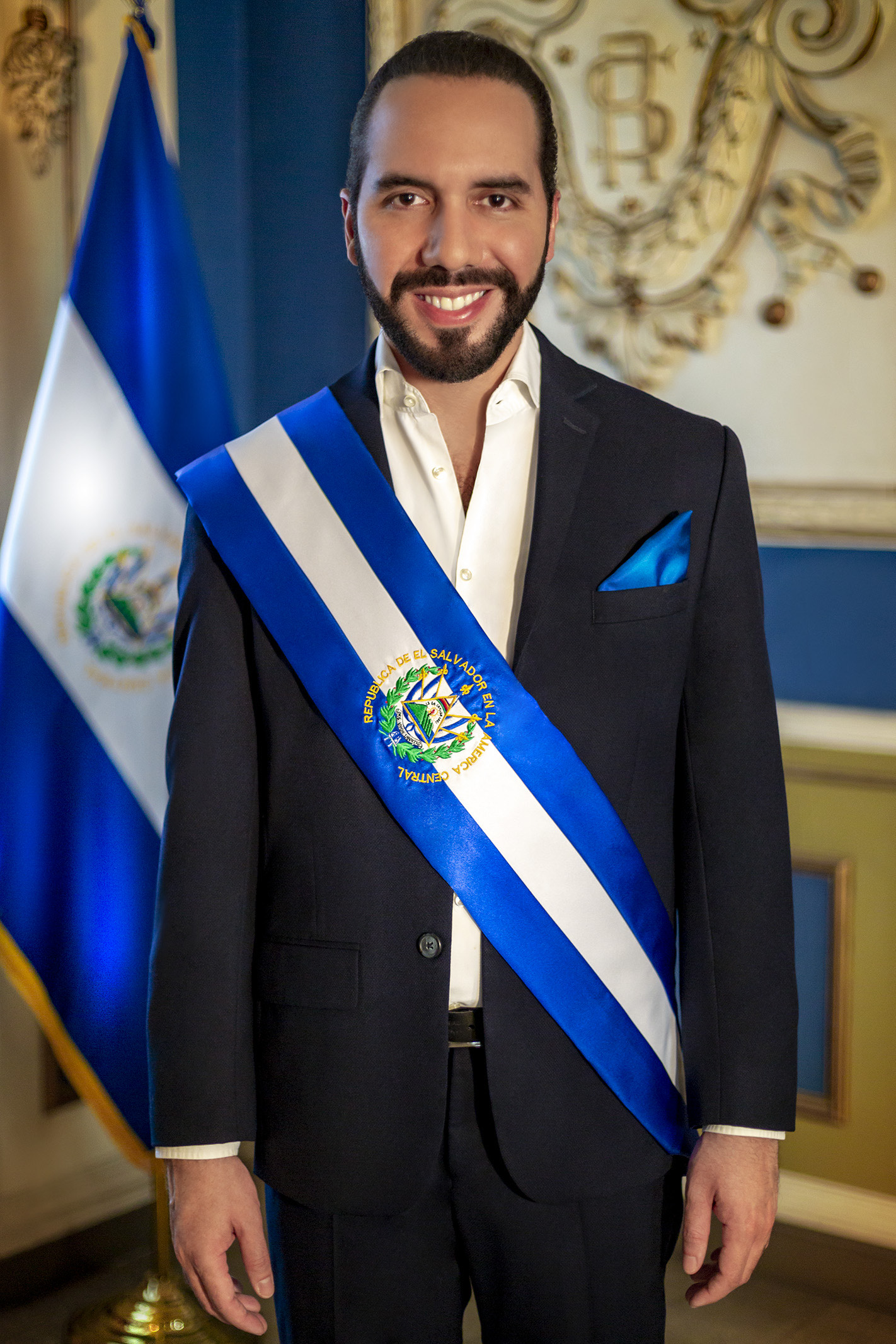 Foto de uso oficial del Presidente Nayib Bukele.